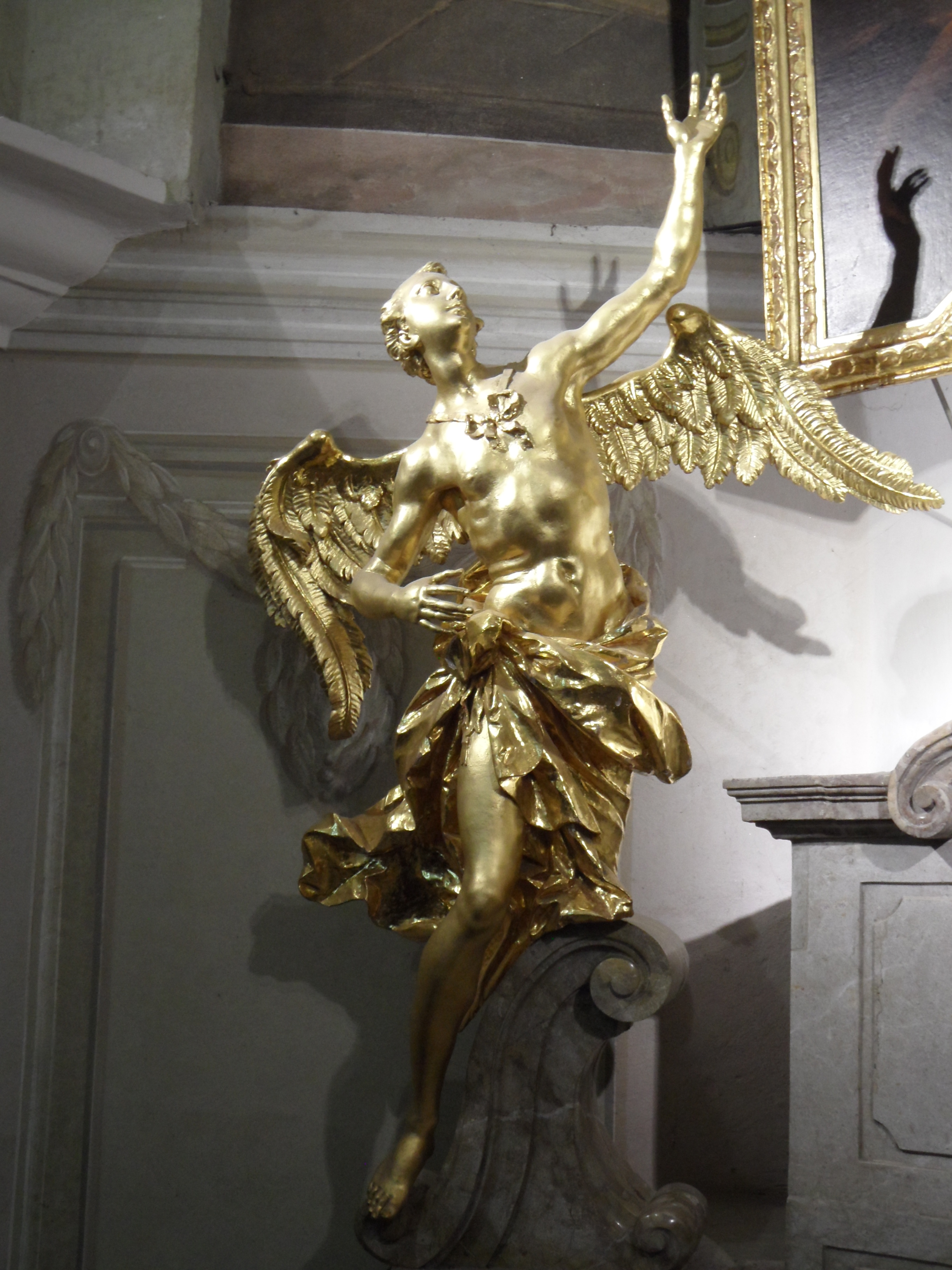 Brno, kostel Nejsvětější Trojice, oltář v Andělské kapli (1766-1779) - Ondřej Schweigl